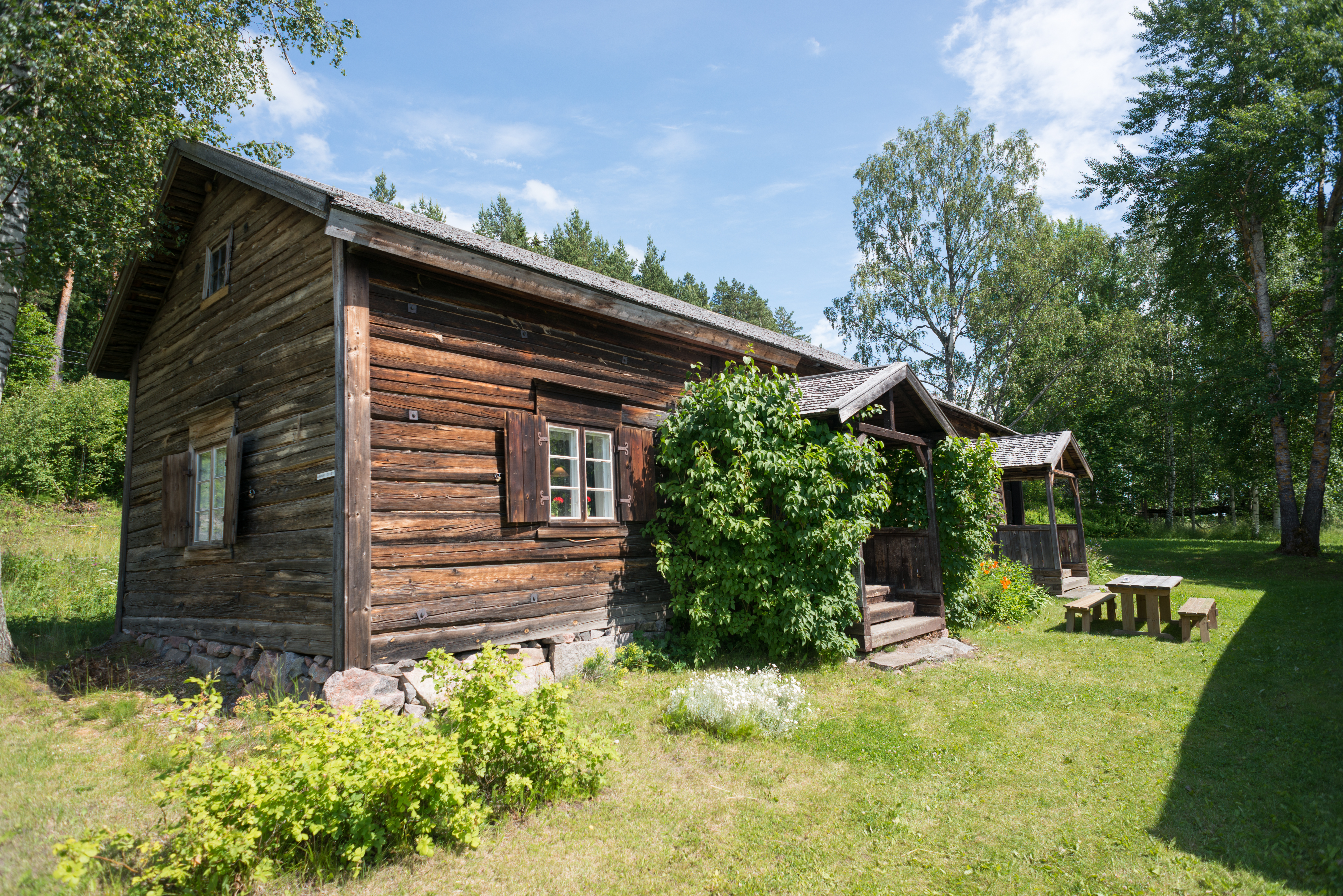 Trömperin kestikievari Halikon Hajalassa Salossa